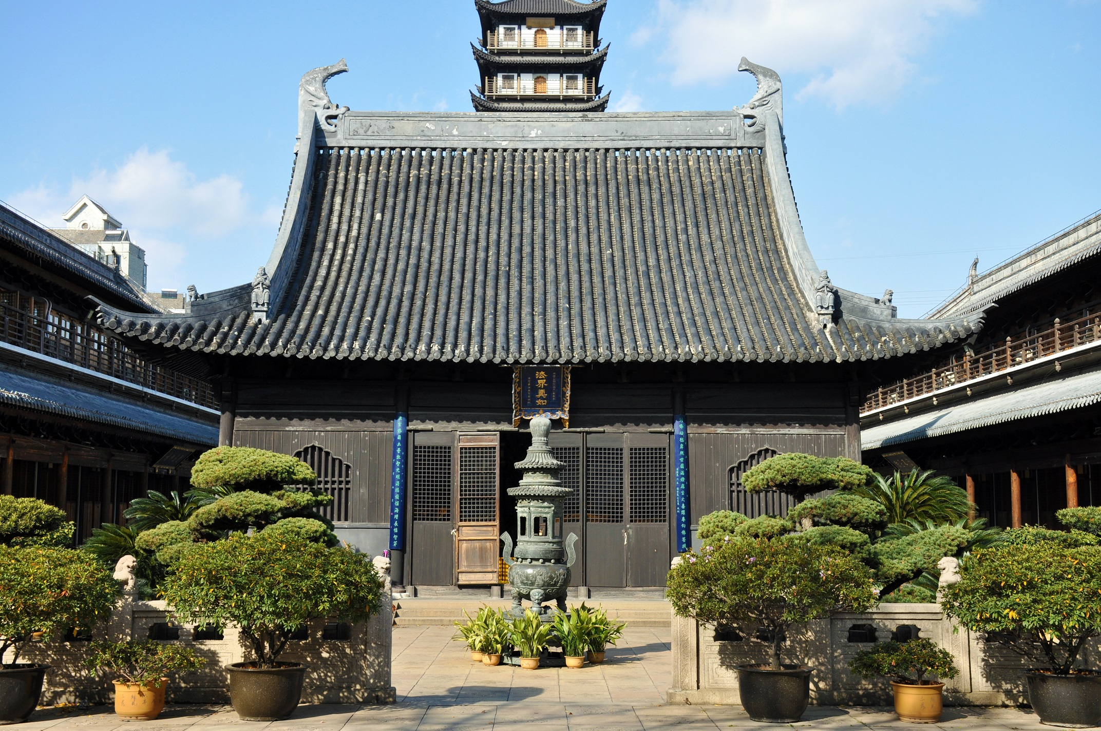 真如寺大殿 真如镇后山门5号 元延祐七年(1320年)